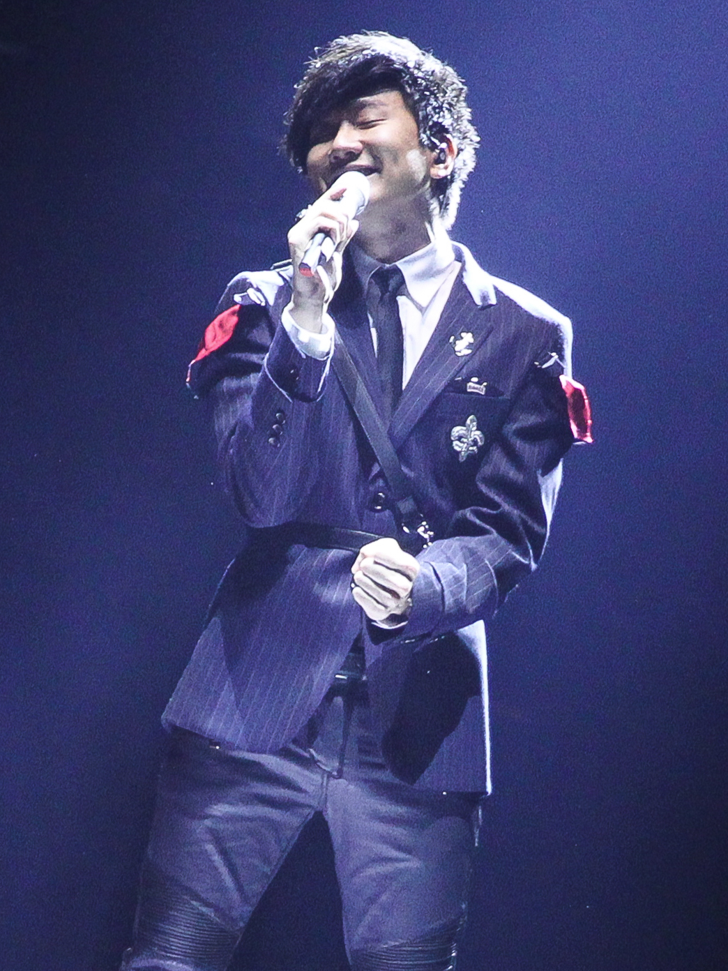 第九屆 KKBOX 年度風雲榜